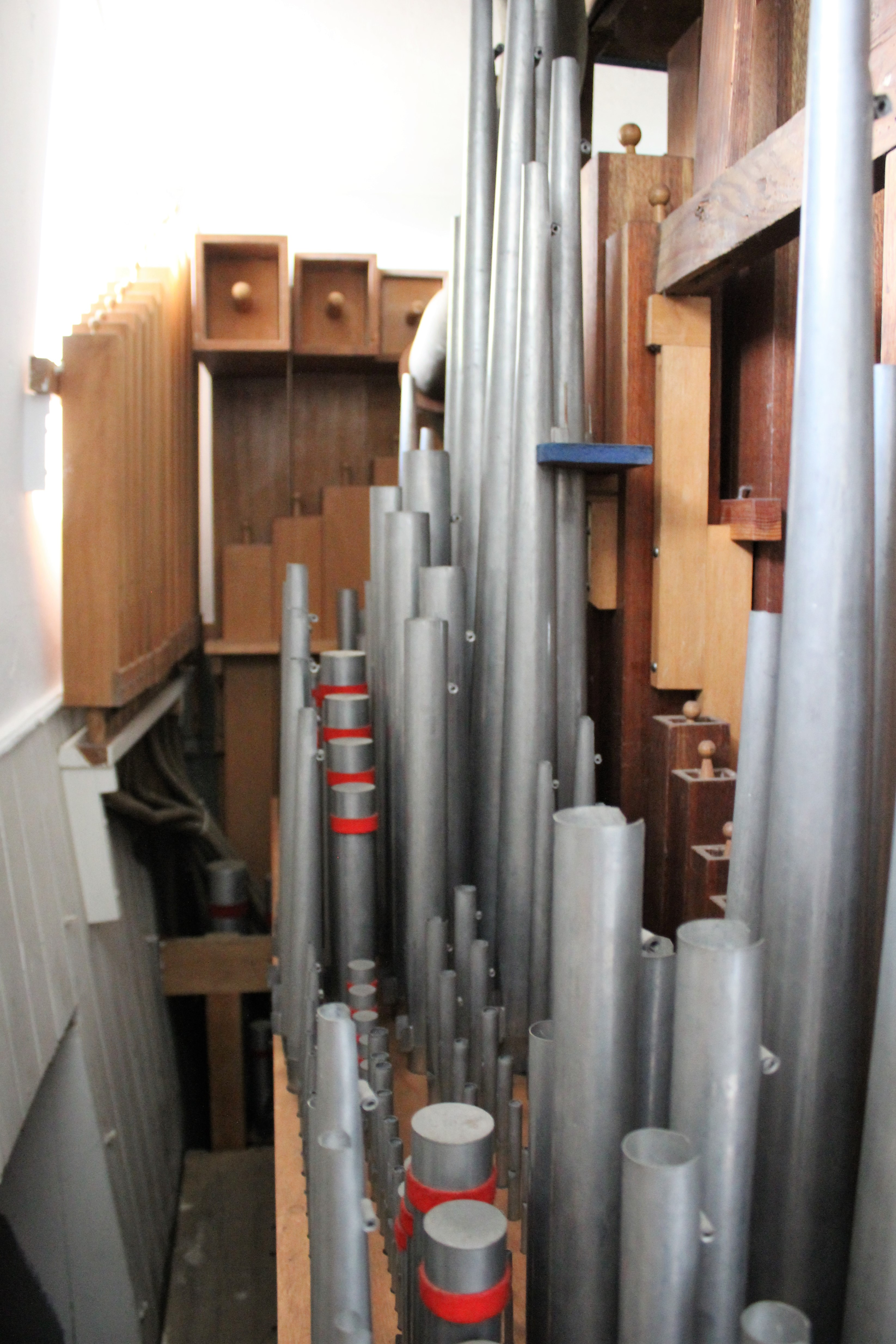 Ev. Kirche Laufdorf, Lahn-Dill-Kreis, Hessen, Deutschland